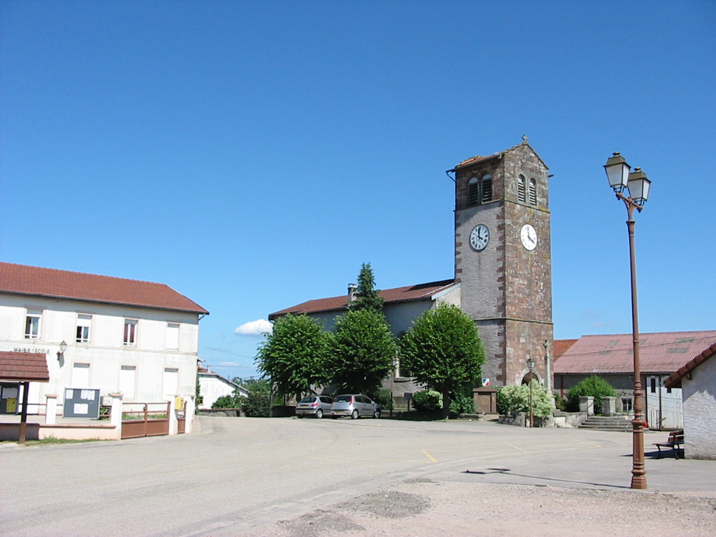 Commune de Dignonville dans les Vosges. La mairie-école et l'église Saint-Vincent.